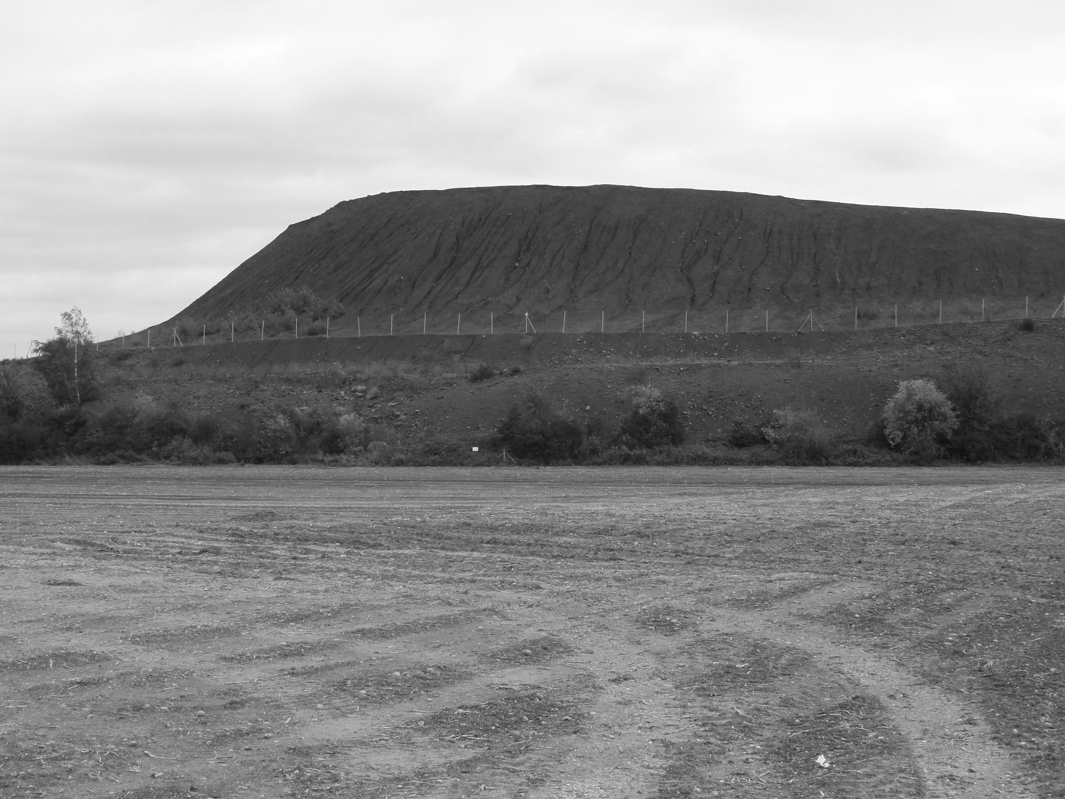 Terril n° 73 dit 18 de Lens, Fosse n° 18 - 18 bis du Groupe de Lens, Haisnes, Pas-de-Calais, Nord-Pas-de-Calais, France.